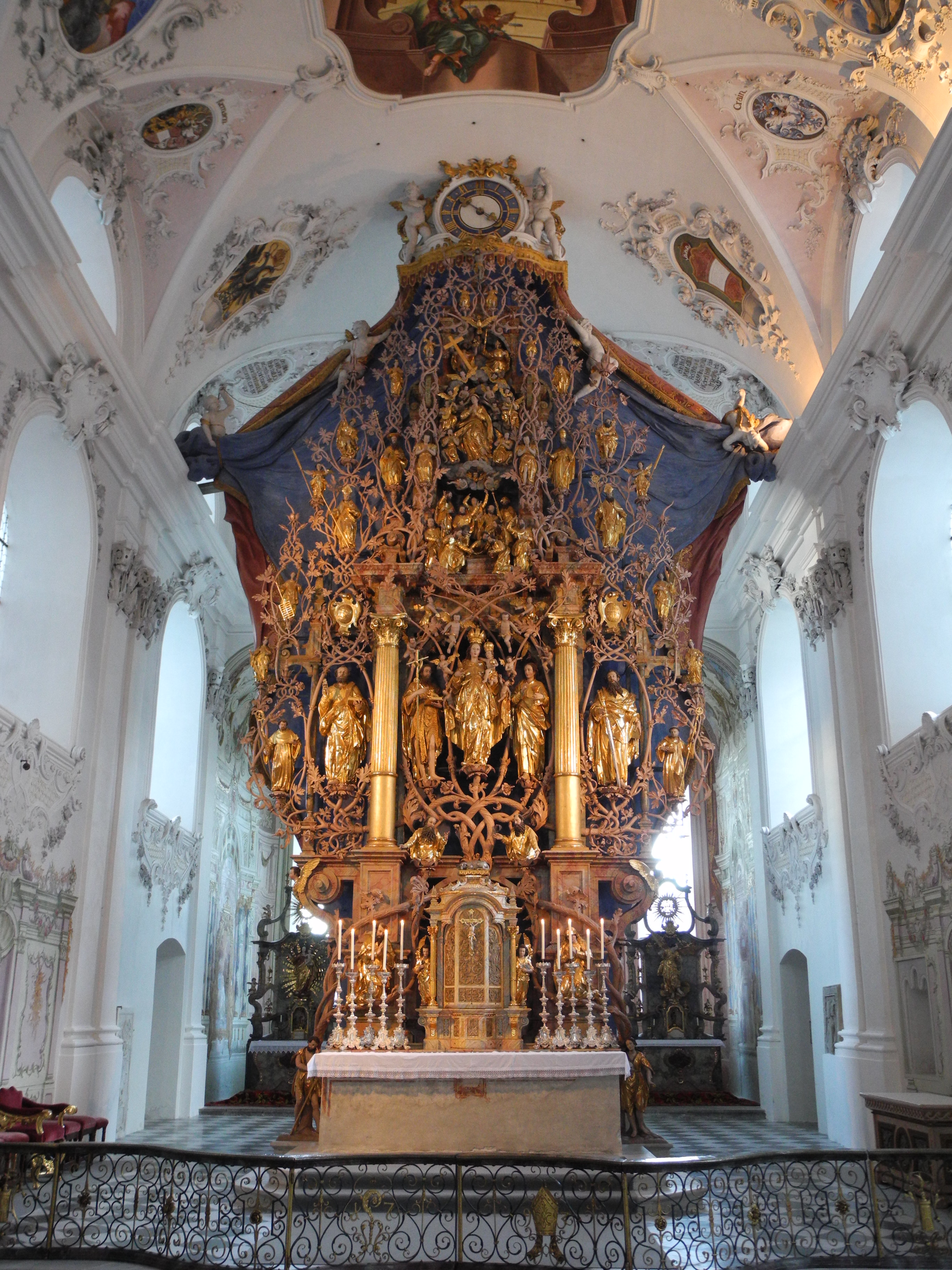 Zisterzienserstift Stams Altar